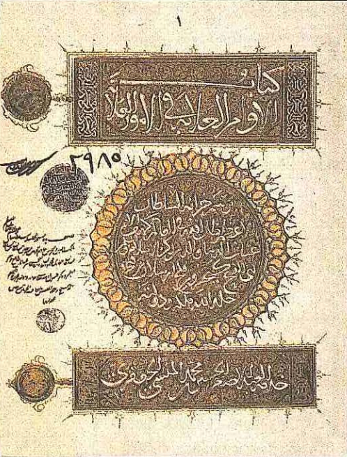 İbn Bîbî'nin el-Evâmirü'l-Alâiyye fi'l-umûri'l-Alâiyye isimli eserinin orijinal el yazmasının unvan sayfası.